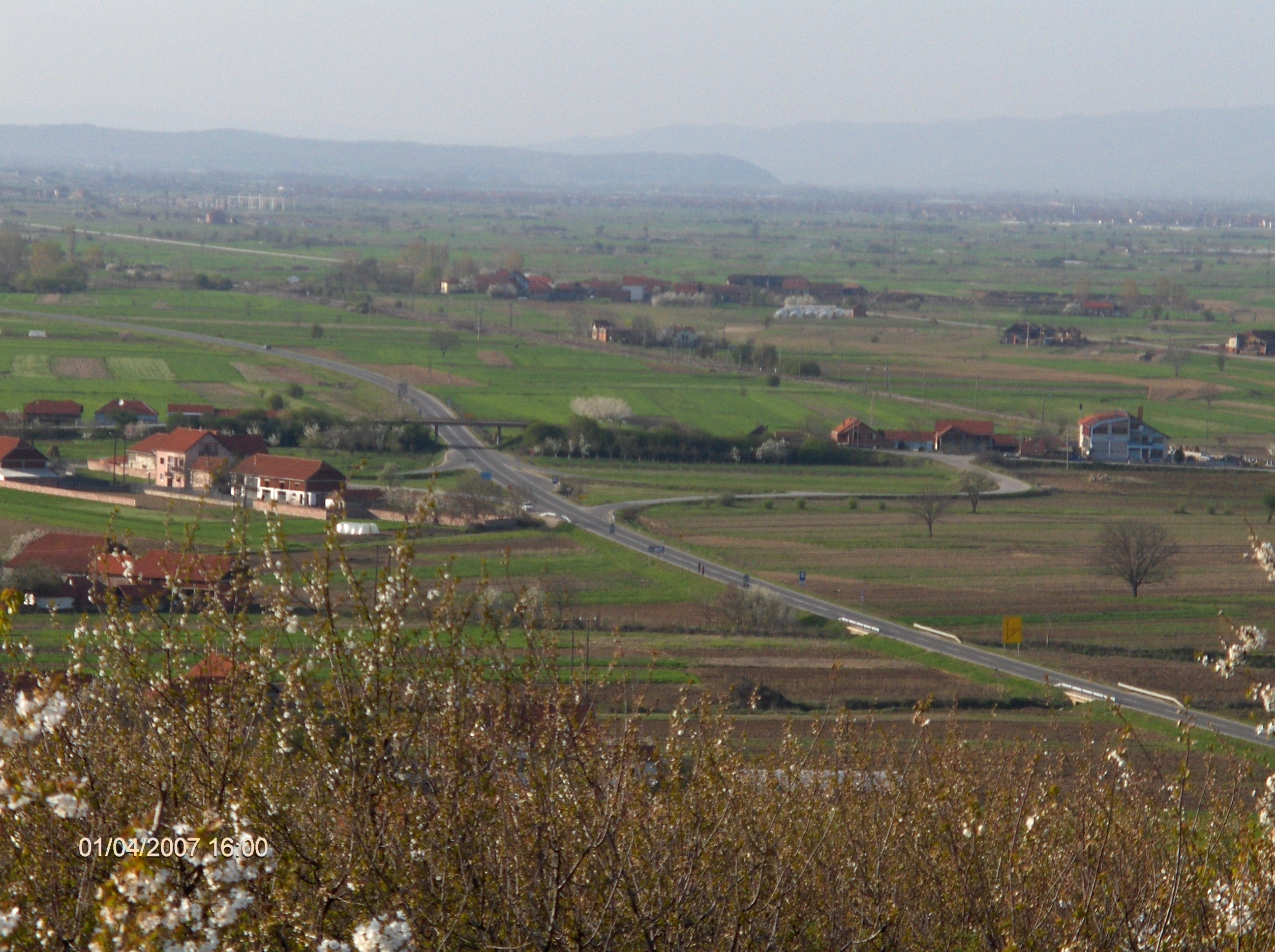 ПЕТЉА - ВЕЛИКА ГРАБОВНИЦА - ОПШТИНА ЛЕСКОВАЦ. Petlja na nekadašnjem autoputu "Bratstva i jedinstva" a današnjem M1 izgradjena sedamdesetih godina prošlog veka na inicijativu tadašnjeg predsednika mesne zajednice Velika Grabovnica, Dobrivoja Ilića zv.Matka. аутор фотографије Дејан Илић Маткин